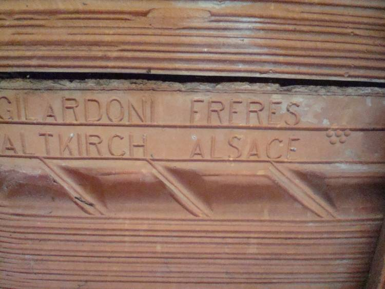 Photo du dessous d'une tuile Gilardoni Frères